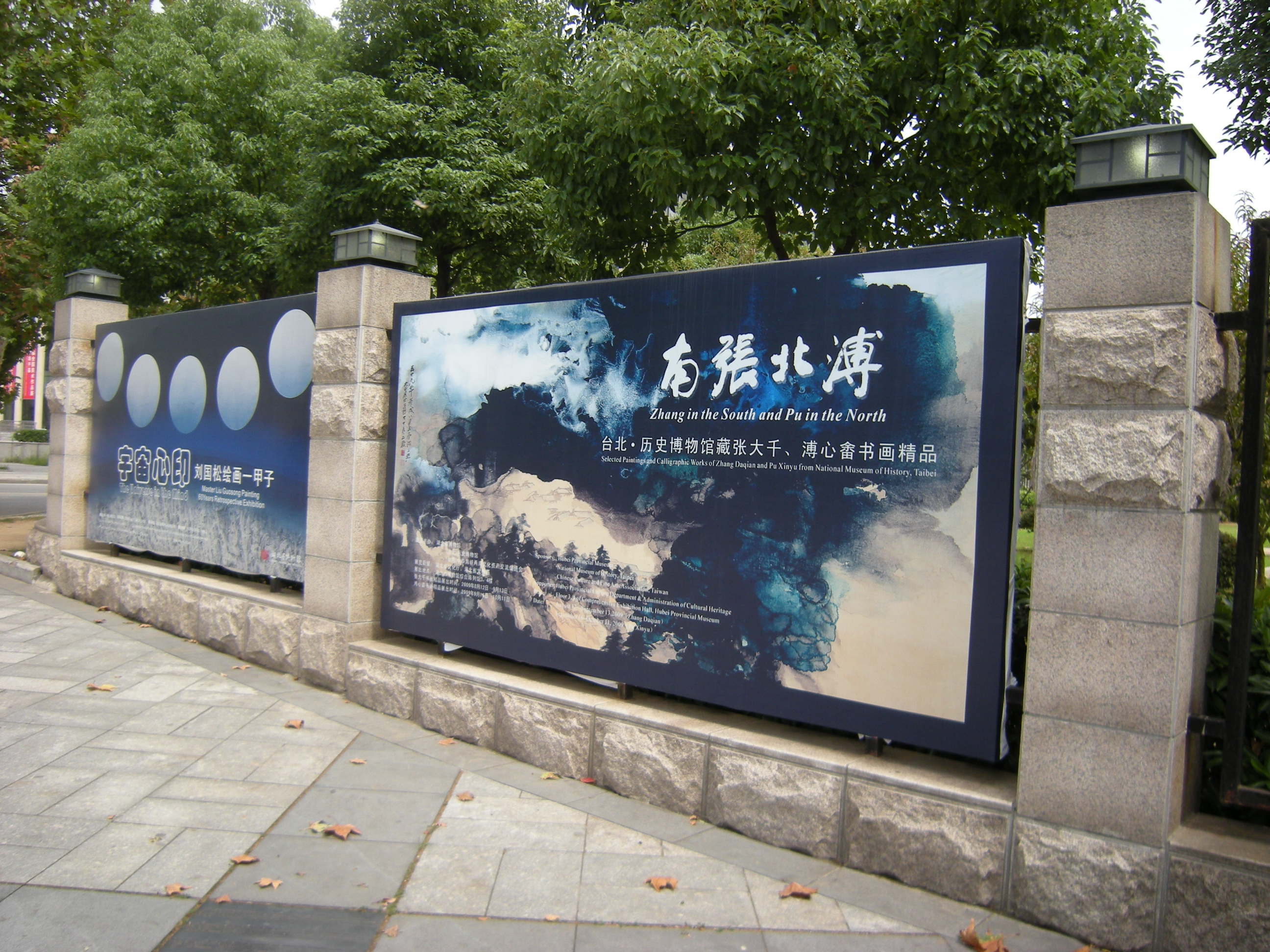 Hubei_Provincial_Museum_1